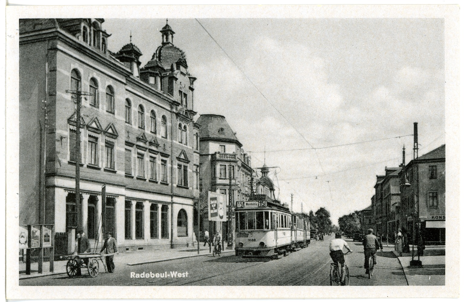 Radebeul; Stalinstraße mit Straßenbahn Linie 15 This postcard is from publisher Brück & Sohn in Meißen ( postcard has a unique number 28799 and is available in a higher resolution at the publisher. This images was uploaded in a cooperation project between Wikipedians and the publisher.